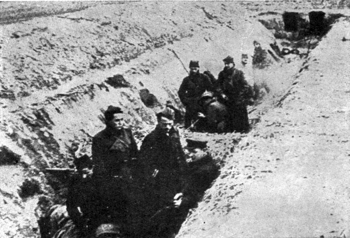 Srpskohrvatski / српскохрватски: U rovovima na Sremskom frontu, decembra 1944.